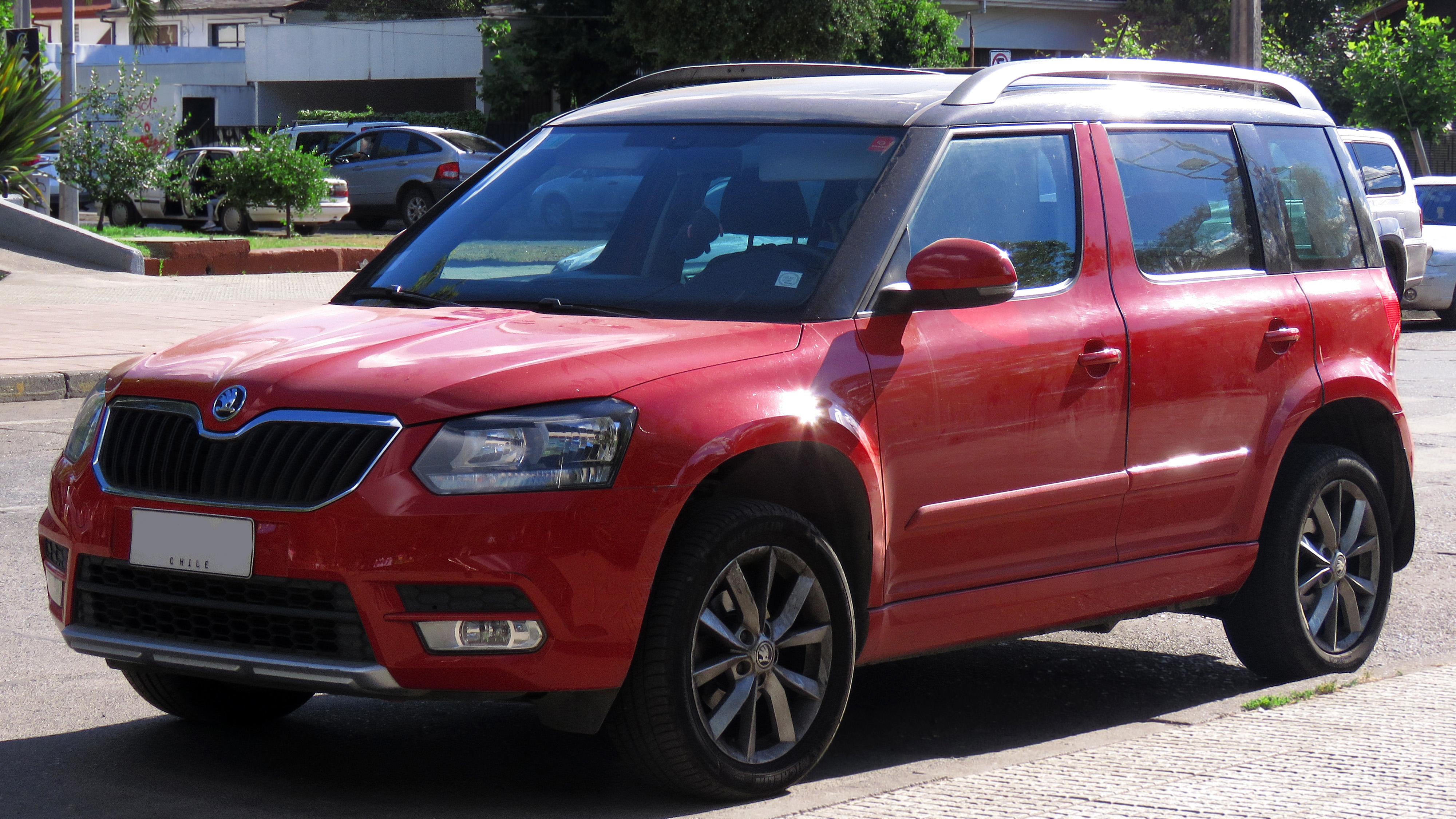 Skoda Yeti 1.2 TSi Ambiente 2015